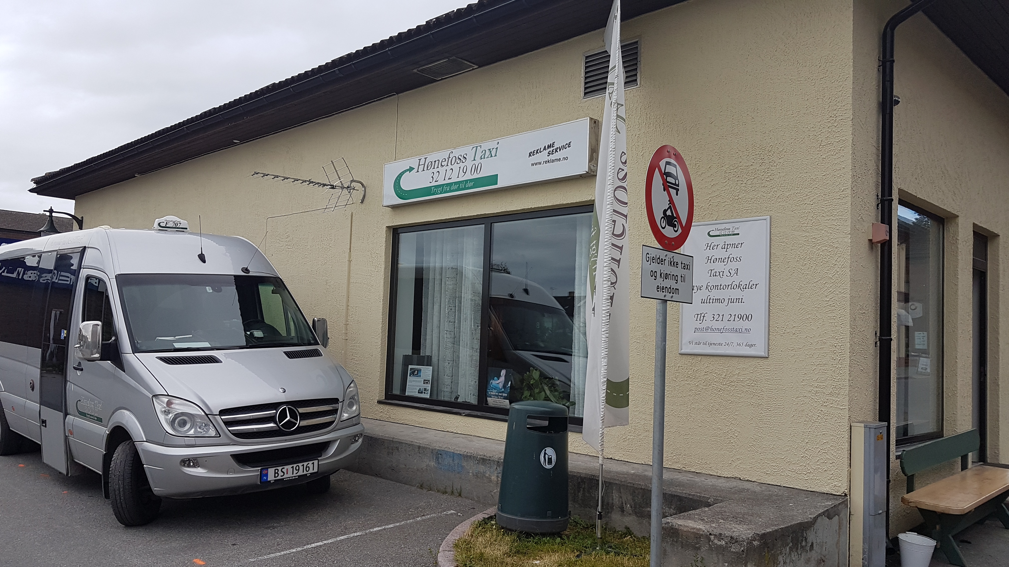 Lokalene til Hønefoss Taxi SA, i Storgaten 8 i Hønefoss. Inngang fra Kong Rings gate. Lokalene ligger i direkte tilknytning til Sentrum stopp (bussholdeplassen).